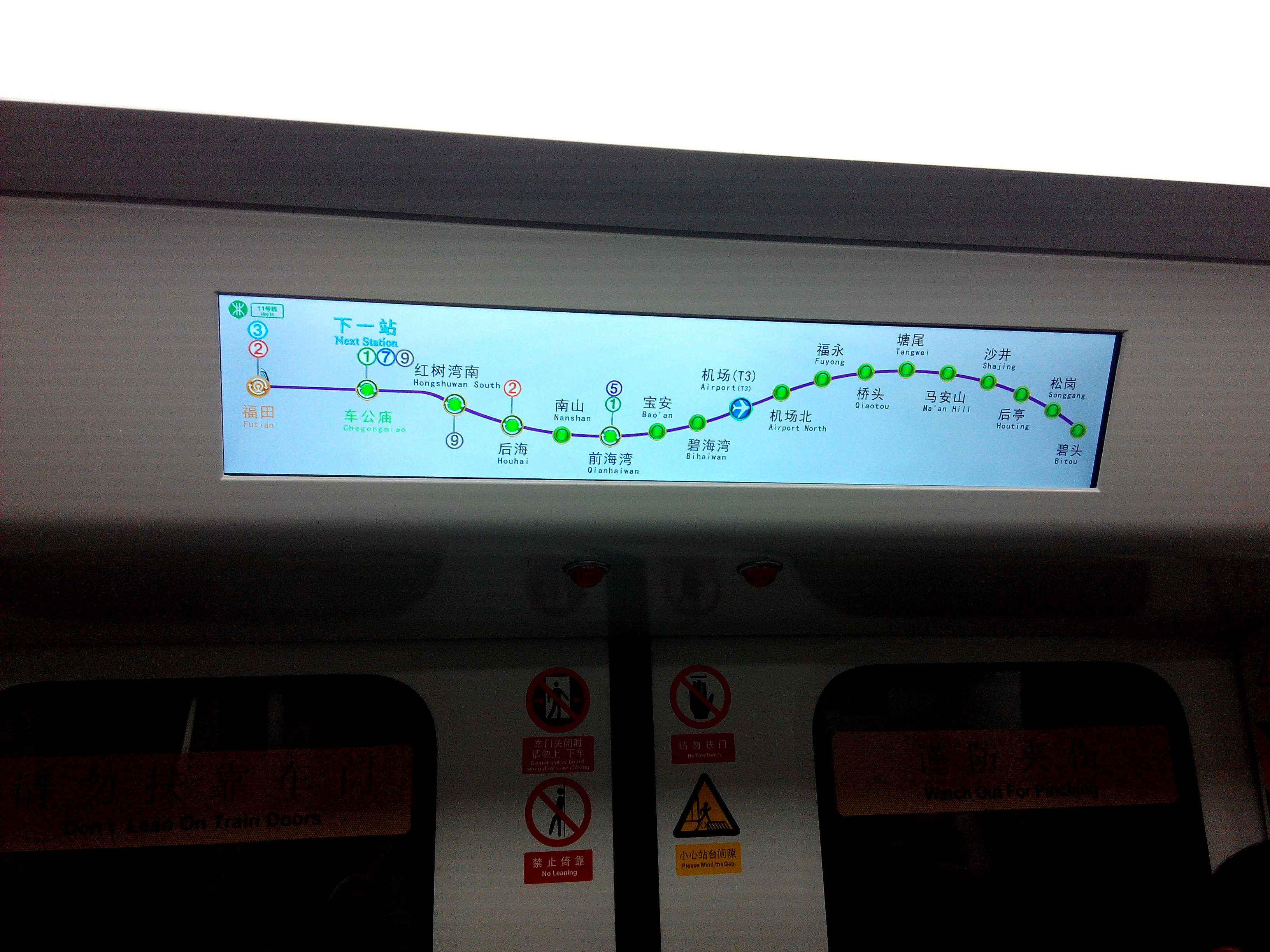 深圳地铁11号线2015款中车株机A型列车 乘客信息显示屏